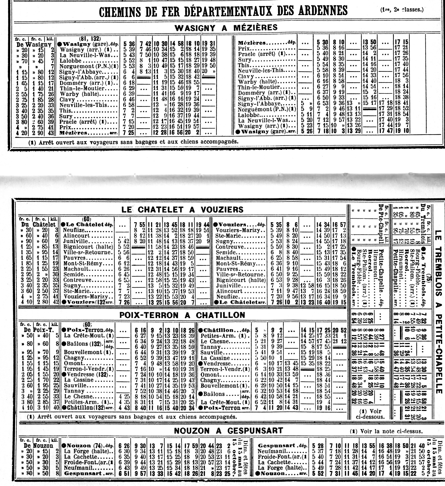 Horaires des lignes des CDA Wasigny - Mézières, Le Châtelet - Vouziers, Poix-Terron - Châtillon et Nouzon - Gespunsart - Mai 1914